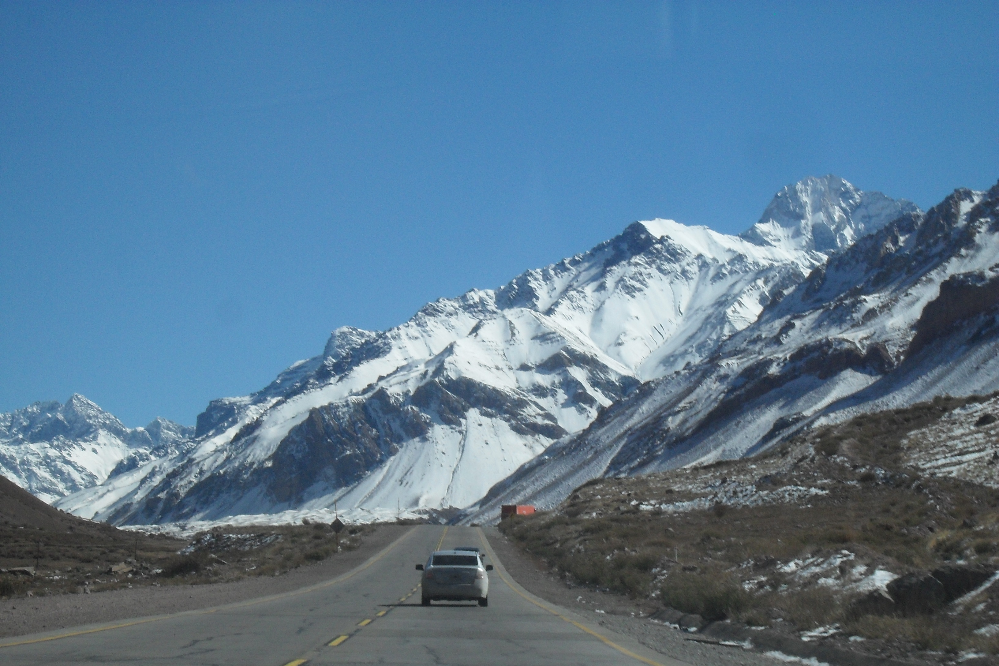 Tramo final de la Ruta Nacional 7 en Argentina